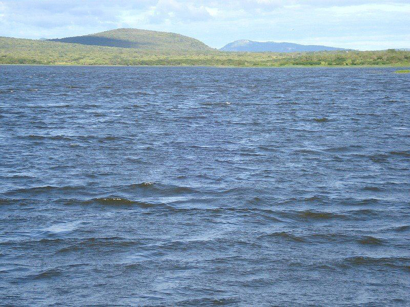 Barragem do Rio Cupim, no município de Independência, Ceará.